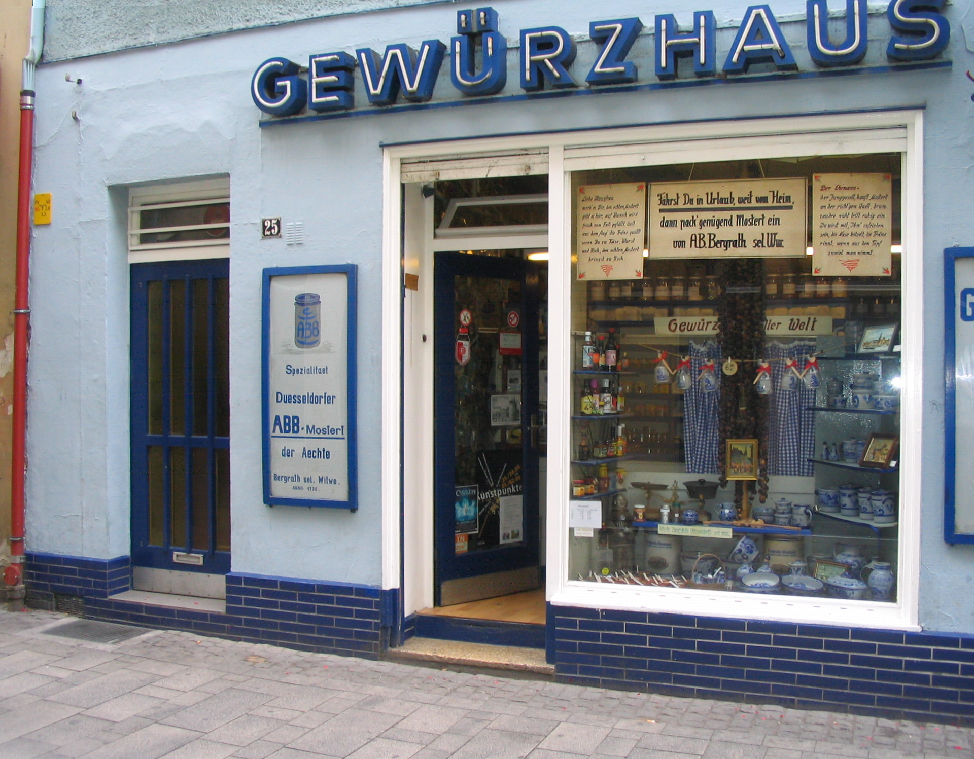 Senf- und Gewürzladen Gewürzhaus Bergrath (Düsseldorfer Mostert), Mertensgasse 25, Düsseldorf.